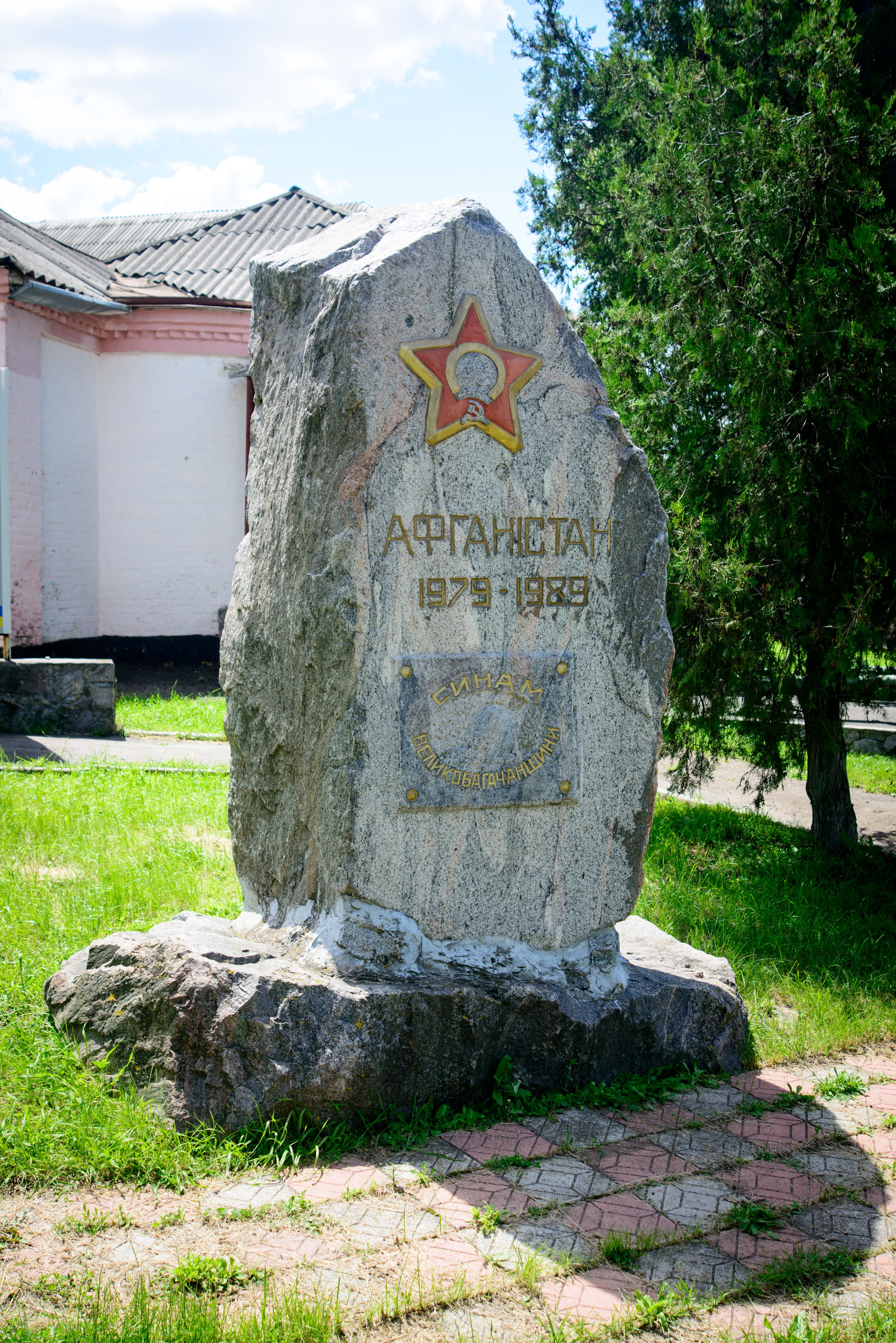 Пам’ятний знак учасникам бойових дій в Афганістані., Велика Багачка смт, Леніна вул.